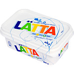 Lätta margarin 40%